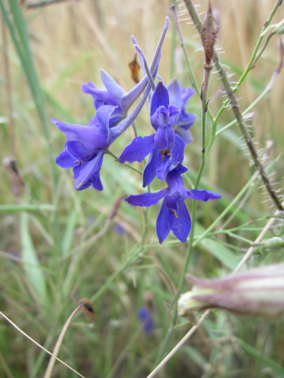 Gewöhnlicher Feldrittersporn (Consolida regalis) bei Reilingen